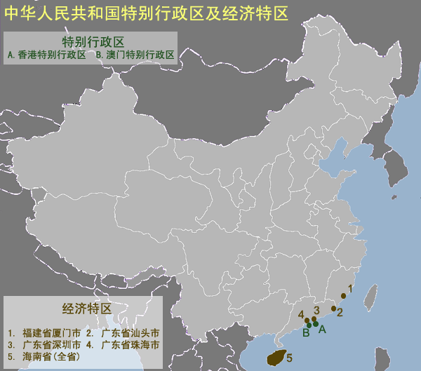 繁體